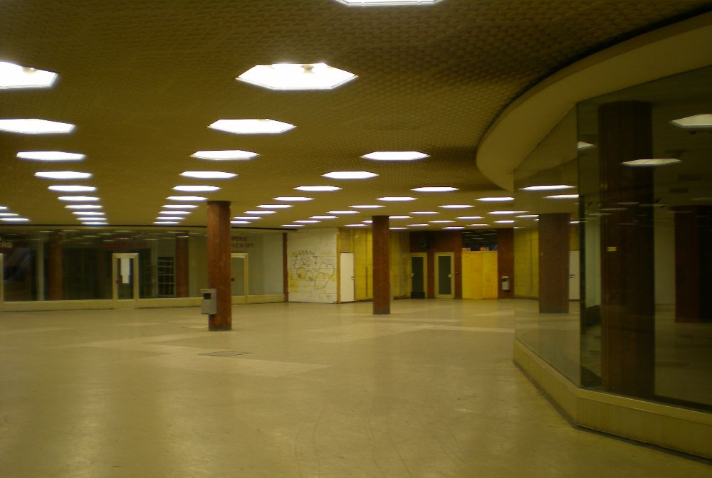 Die Albertinapassage ist eine Fußgängerunterführung unter der Kreuzung Opernring / Operngasse in Wien.